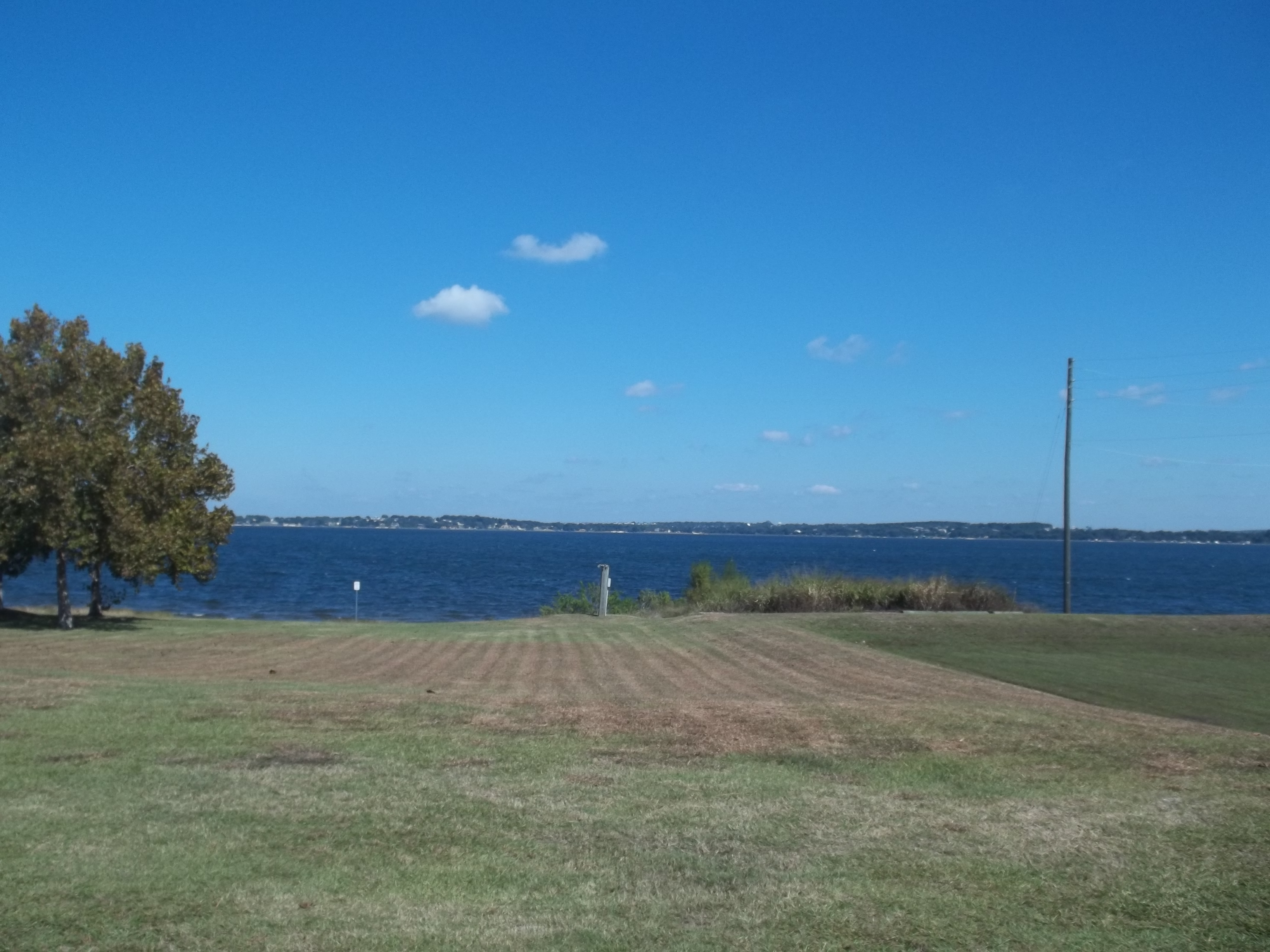 Clermont, Florida: Lake Minneola